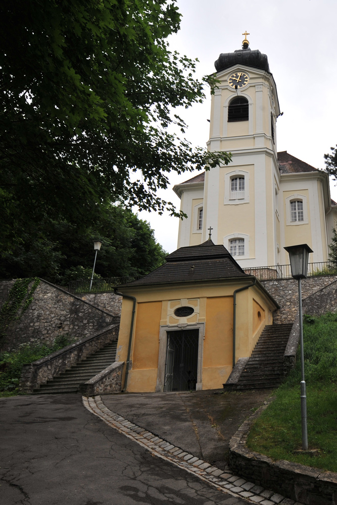 Kaltenleutgeben: Kath. Pfarrkirche, Wallfahrtskirche hl. Jakob der Ältere und Ummauerung mit Stiegenanlage